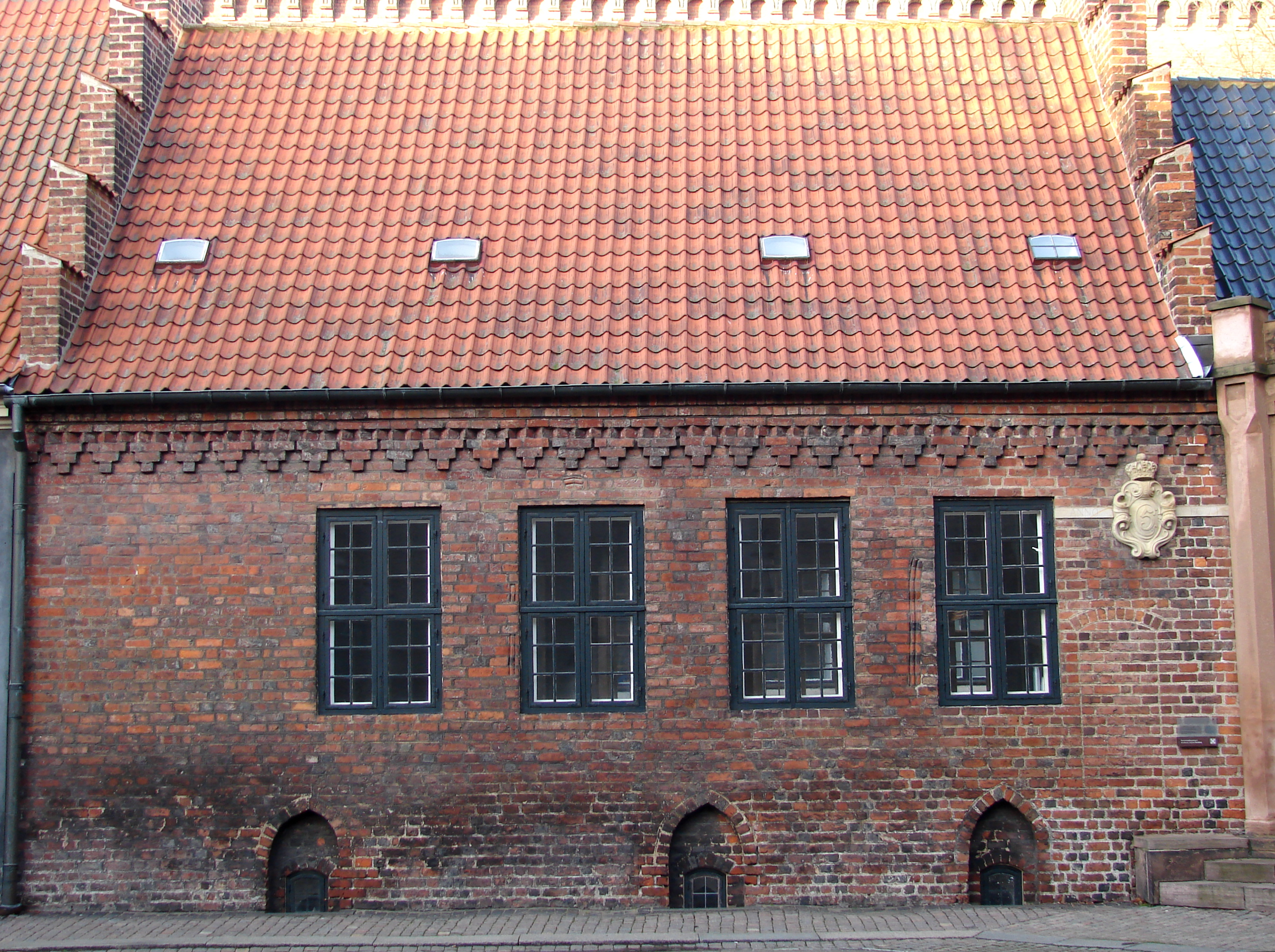 Konsistoriebygningen ved Universitetet med Christian Vs monogram, København